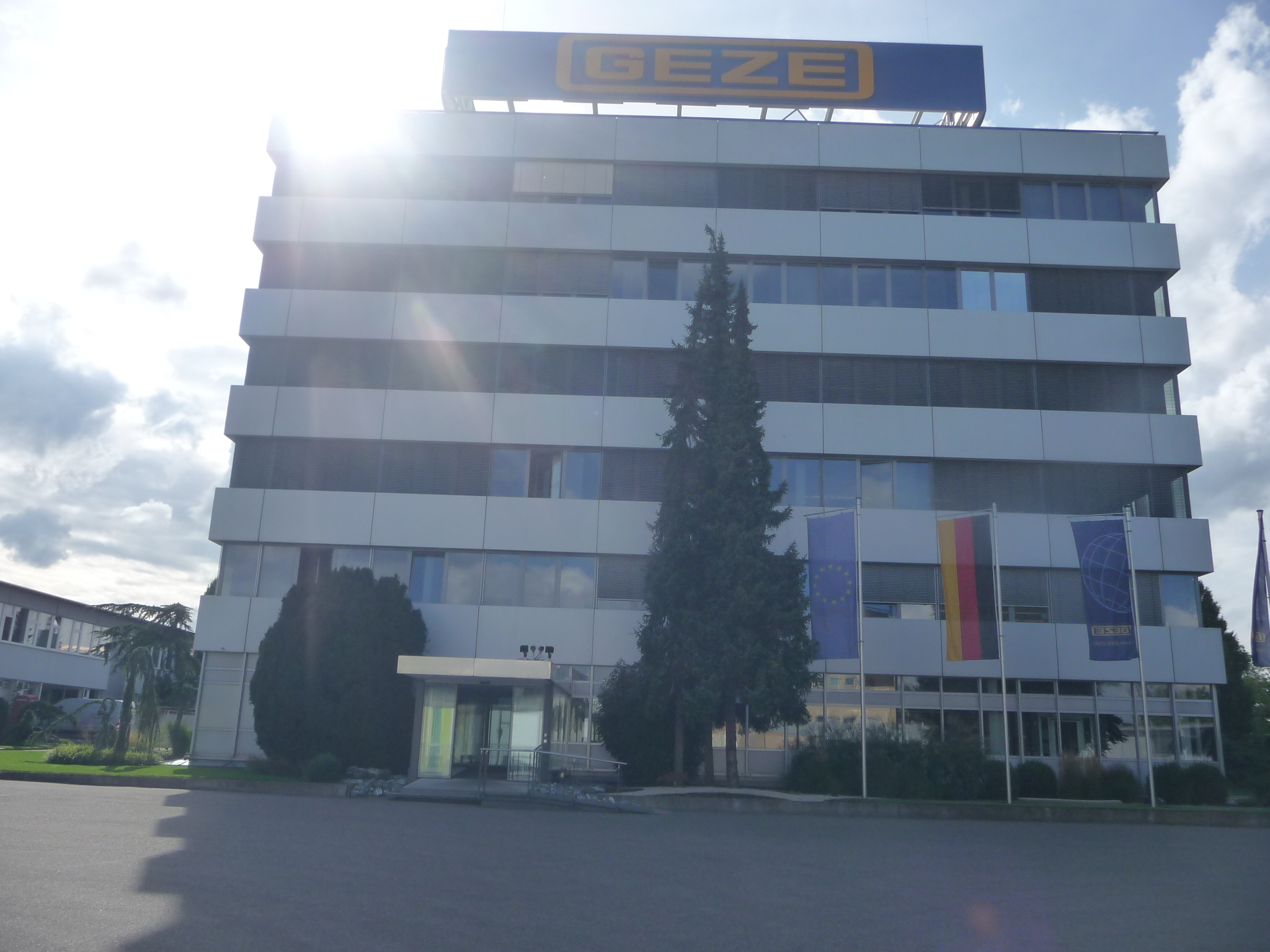 Hauptverwaltung der Fa. GEZE, Leonberg, im August 2014